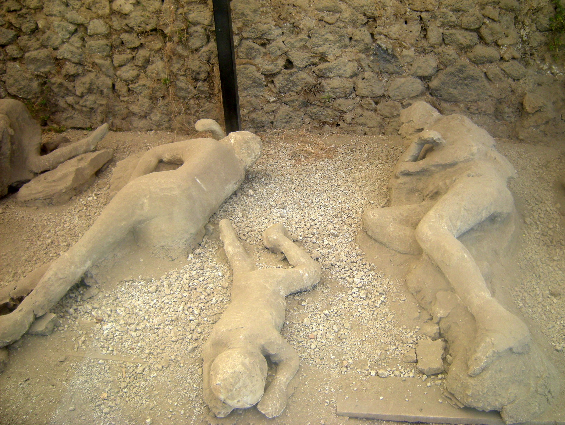 A erupção do Vesúvio (79 d.C.) provocou uma intensa chuva de cinzas que sepultou completamente a cidade. As cinzas e a lama moldaram os corpos das vítimas, permitindo que fossem encontradas do modo exato em que foram atingidas pela erupção.